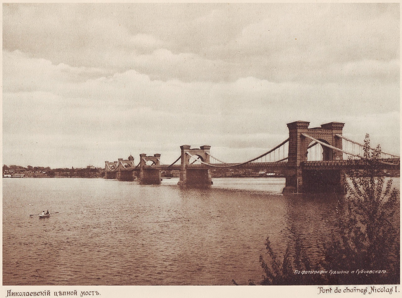 Ланцюговий міст Київ 1911